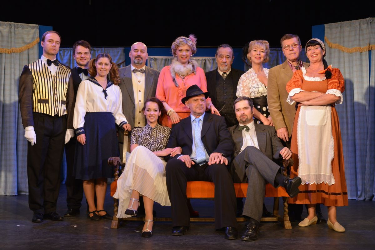 Orbók Attila:Nem válok el. A stáb.